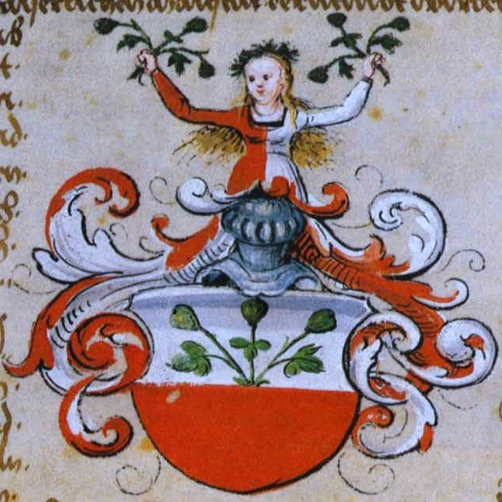 Wappen des hessischen Kanzlers Johann Feige von Lichtenau (1482–1543)